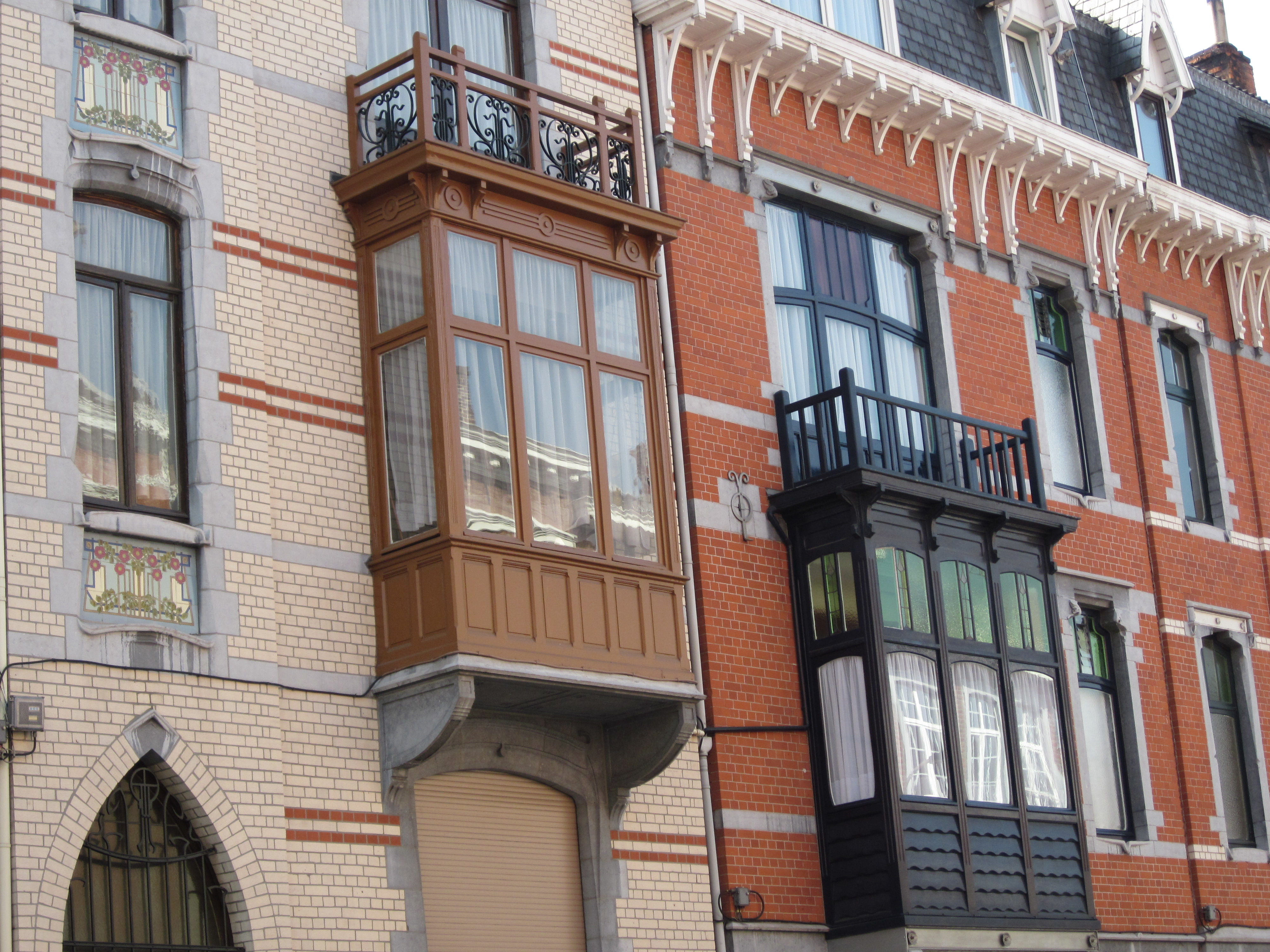 nusbaum